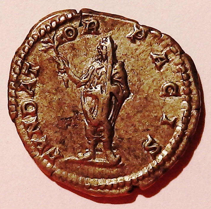 Denar des Septimius Severus, auf dem er sich als Begründer des Friedens feiern lässt (FVNDATOR PACIS), Kampmann 49.71